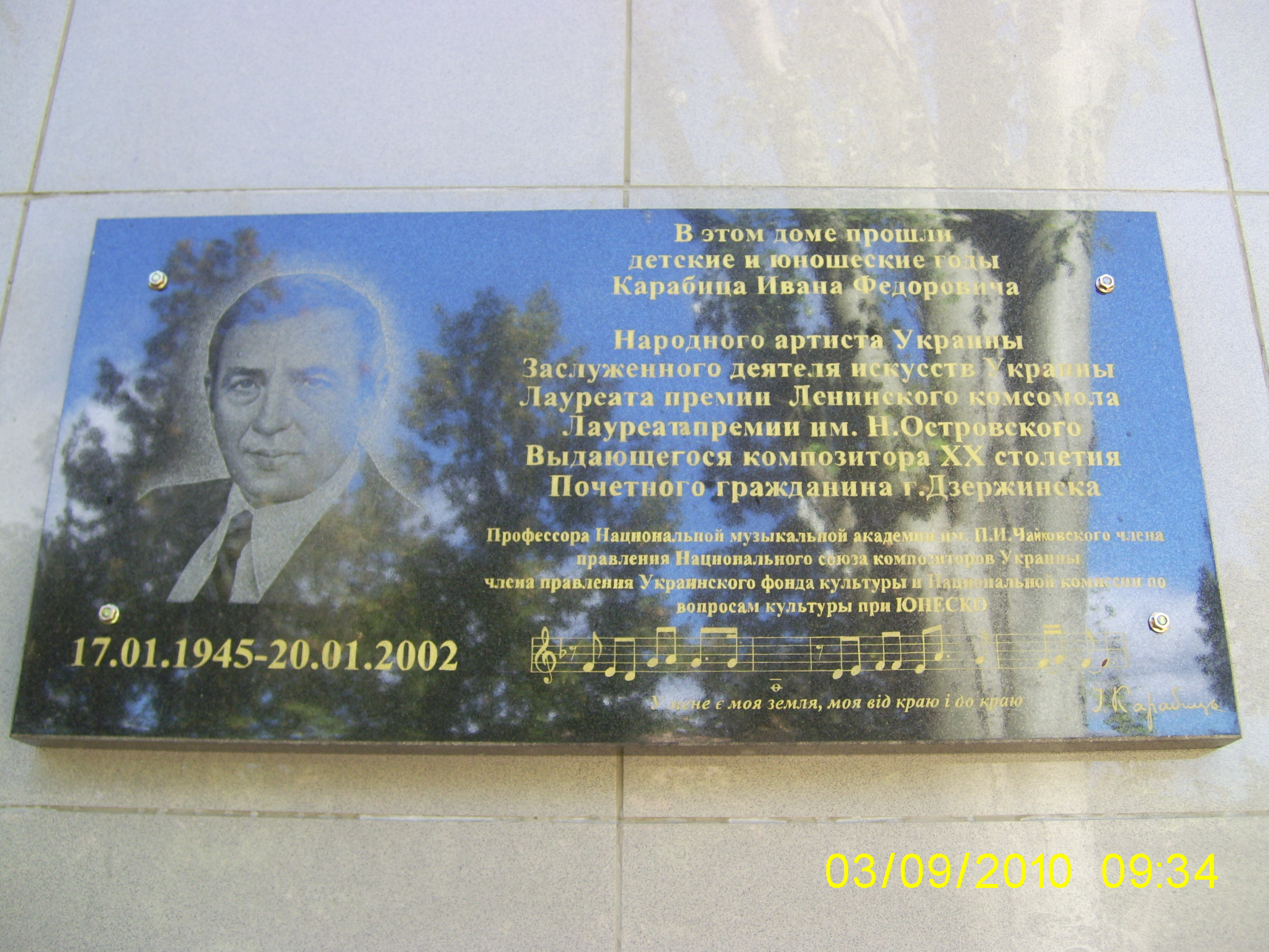 Дзержинськ, Меморіальна дошка І. Ф. Карабицю